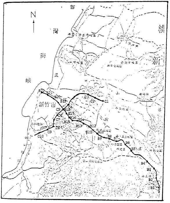 新竹捷運早期的路網規畫方案之一